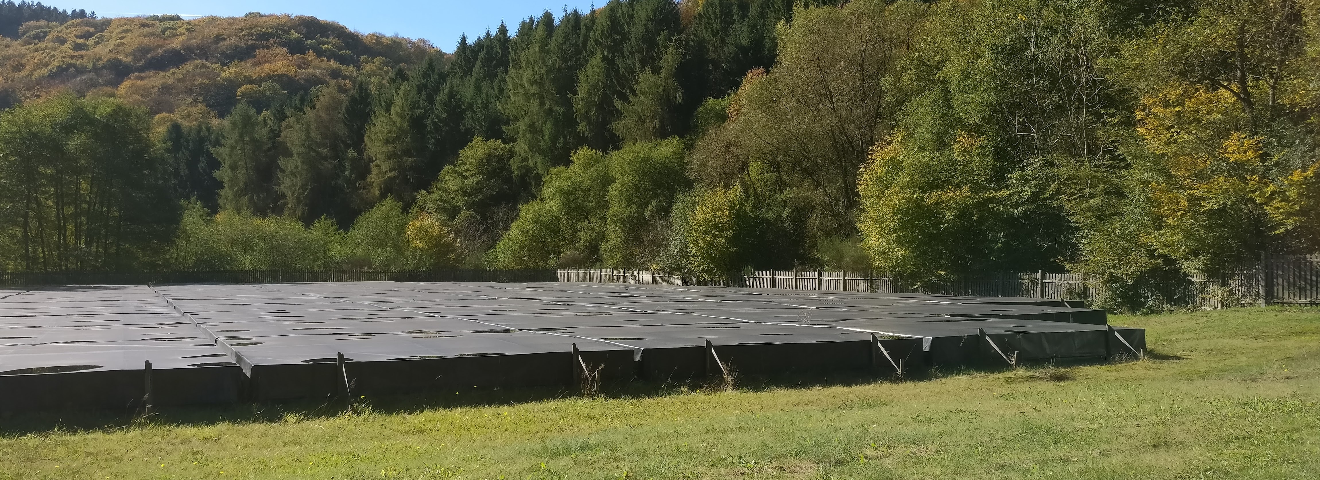 Das Bild zeigt die im Jahr 2009 installierte, hochfrequente LOFAR-Station am Radioteleskop Effelsberg. Das Feld besteht aus 96 Einzelantennen und war die zweite LOFAR-Station überhaupt.[1]